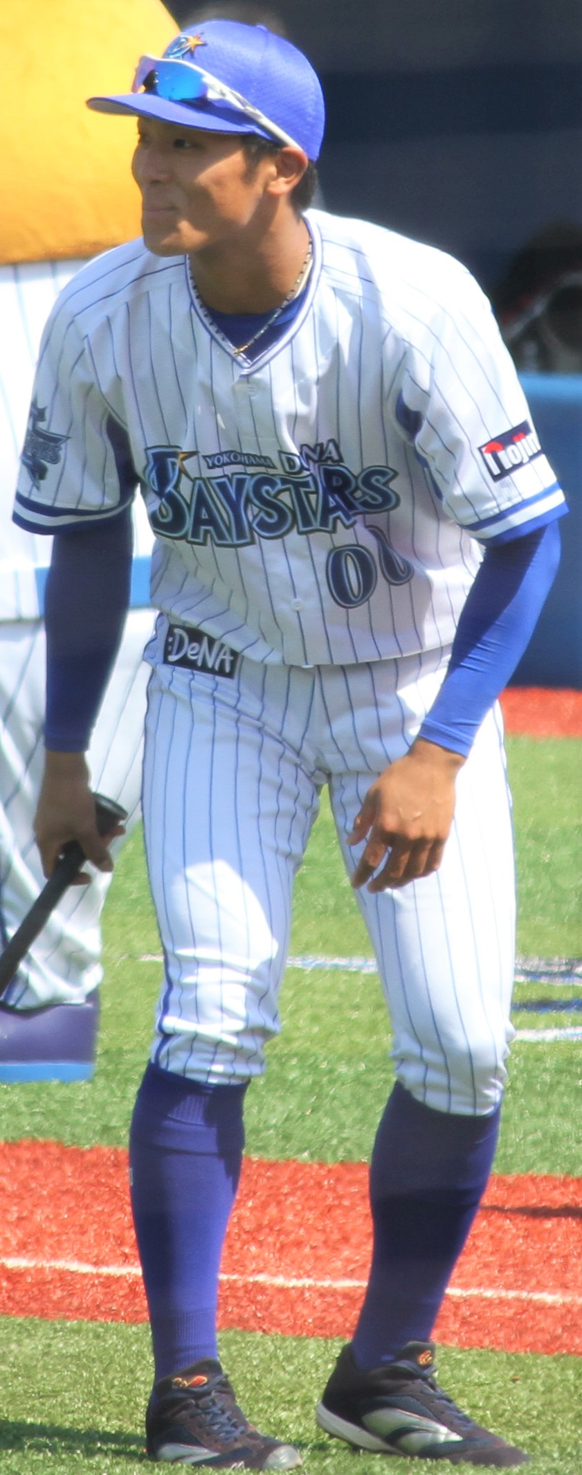 横浜DeNAベイスターズ内野手の宮本秀明。横浜スタジアムにて。